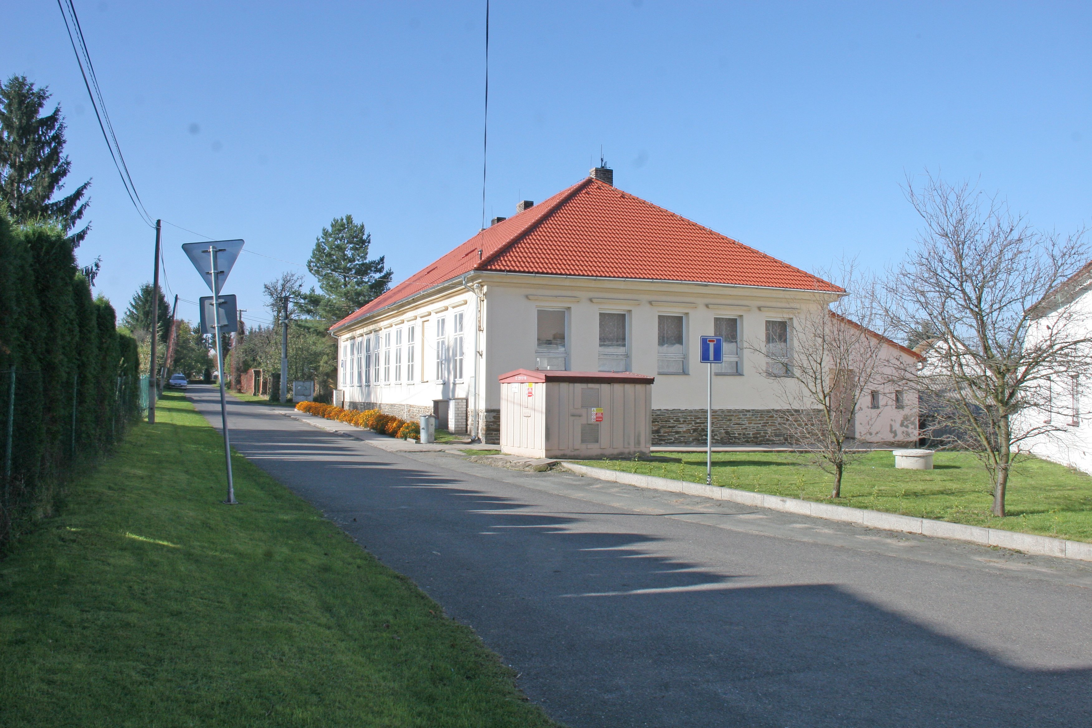 Lovčice škola